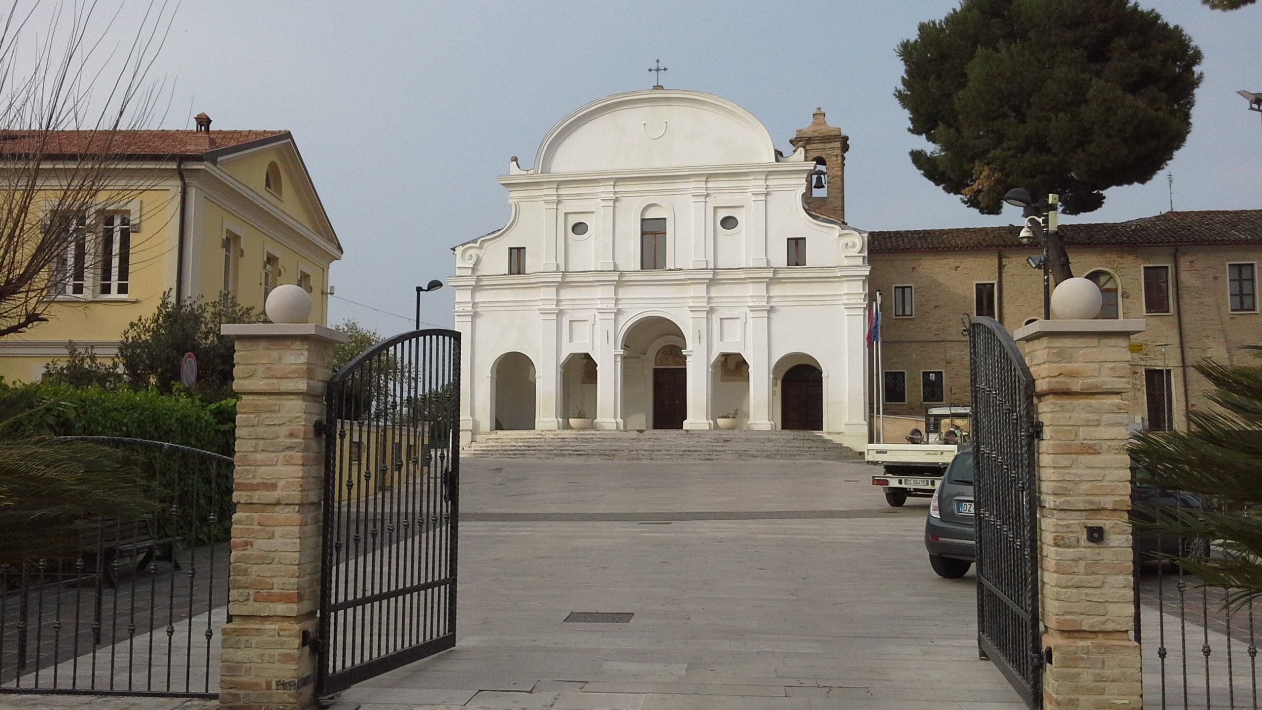 Chiesa di Santa Maria della Pietà ed ex Convento dei frati minori francescani. XVI secolo.